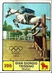 La Edizioni Panini Modena nella stagione 1968-69 emise una collezione di figurine chiamata "Campioni dello sport". Questa è la figurina n° 396 che rappresenta Gian Giorgio Trissino, prima medaglia d'oro olimpica italiana